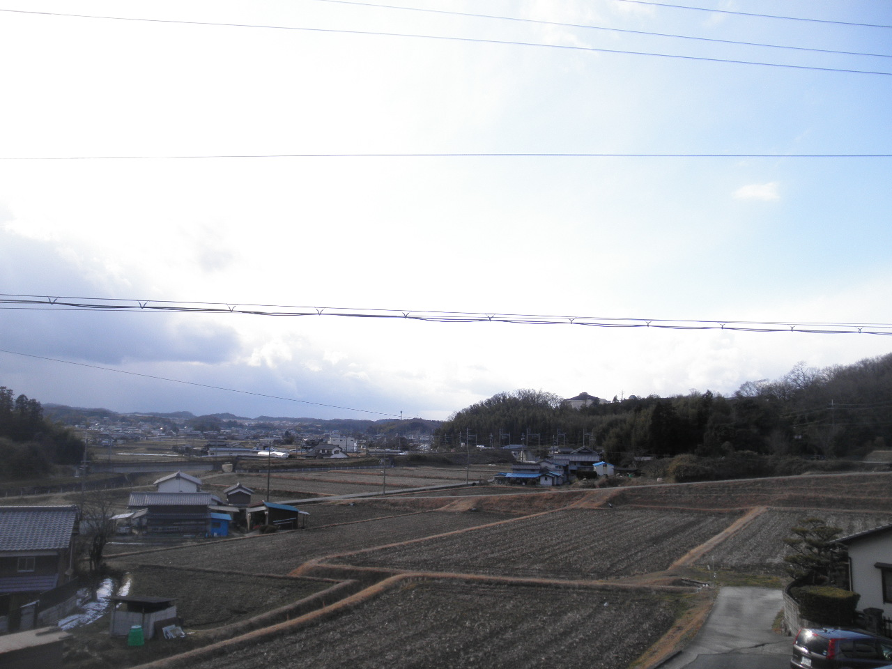 兵庫県神戸市北区長尾町宅原